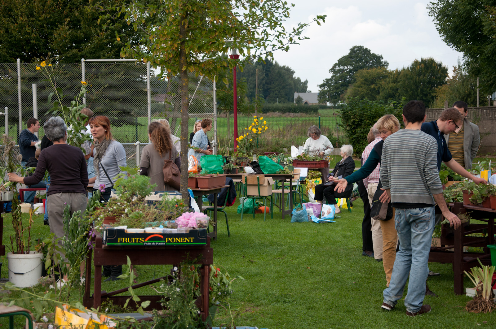 Troc aux plantes organisé par le CPIE Bocage de l'Avesnois en automne 2013, à Taisnières sur Hon (59570)